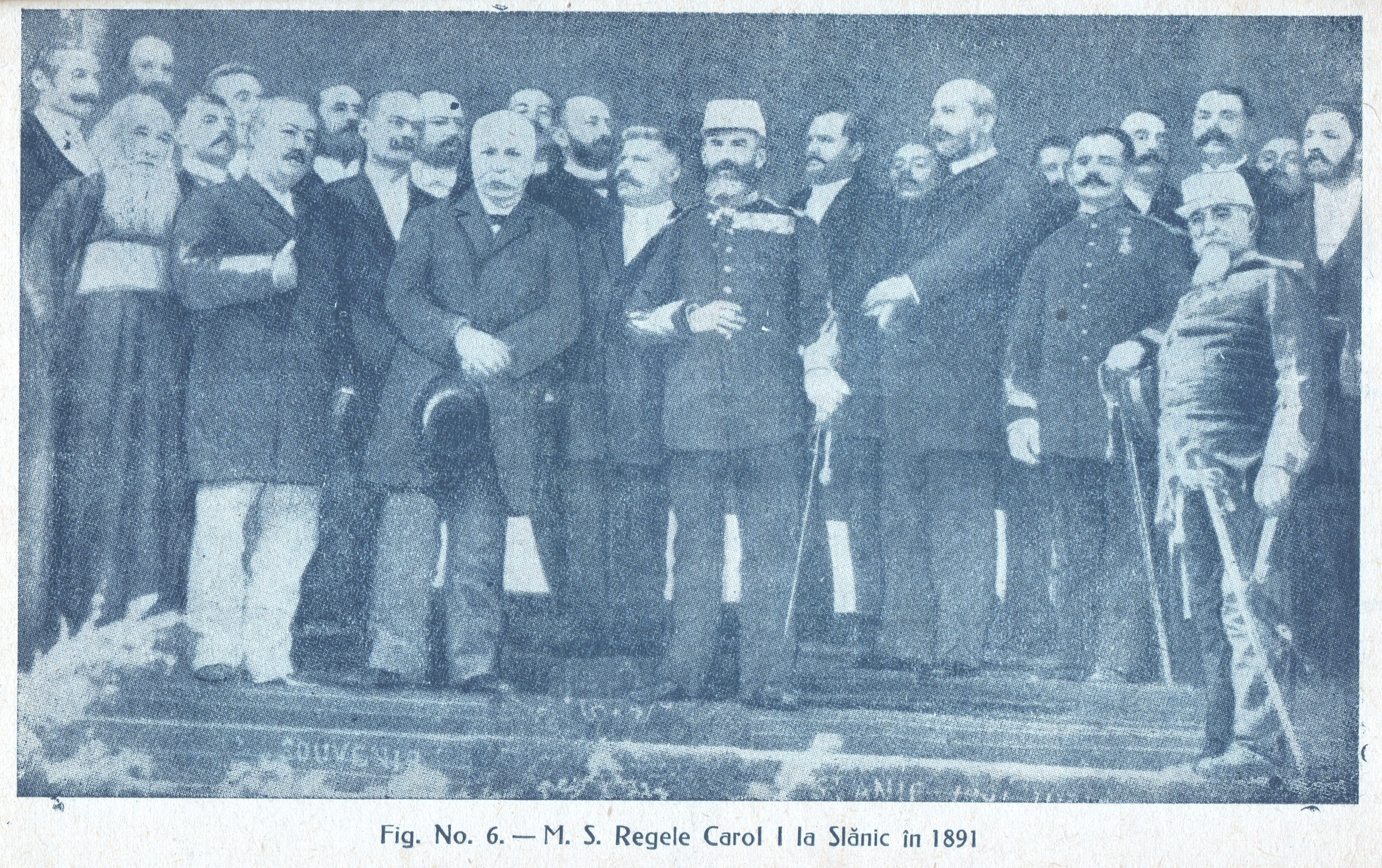 Regele Carol I la Slănicul Moldovei. Fundal hârtie scos în Photoshop CS6.